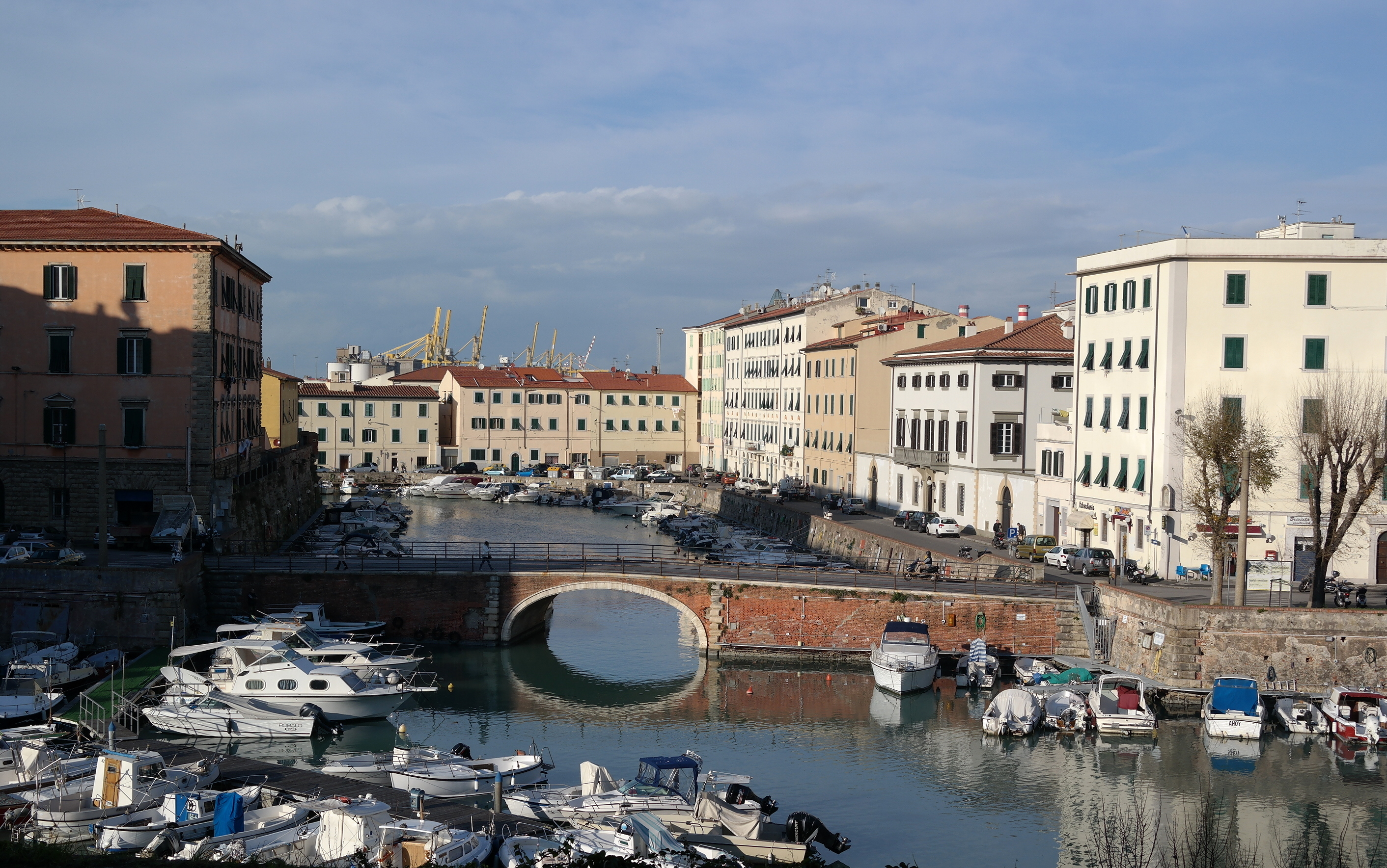 Rivellino San Marco a Livorno